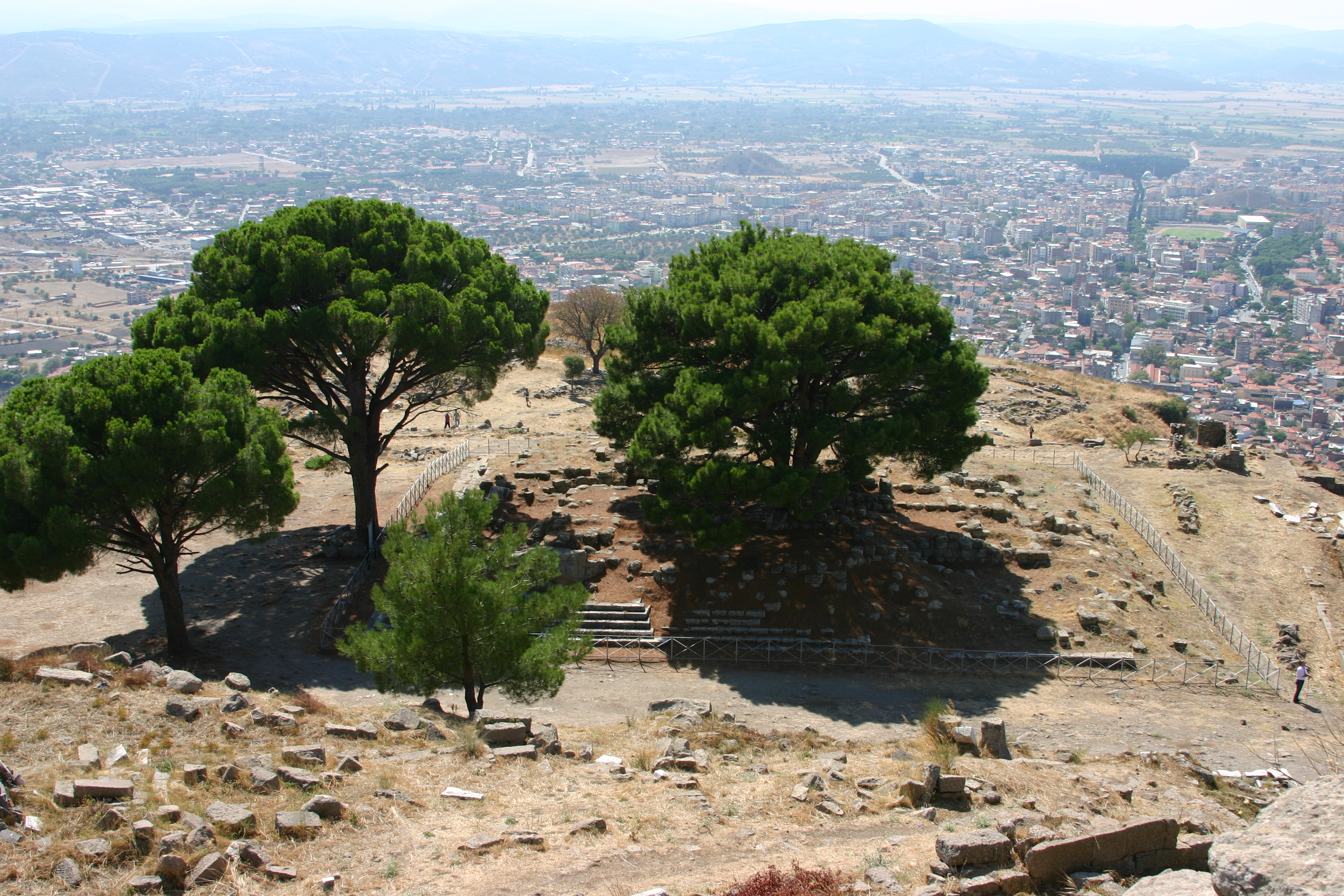 Local onde se localizava o chamado "Altar de Pérgamo" (Altar de Zeus), agora em Berlim.